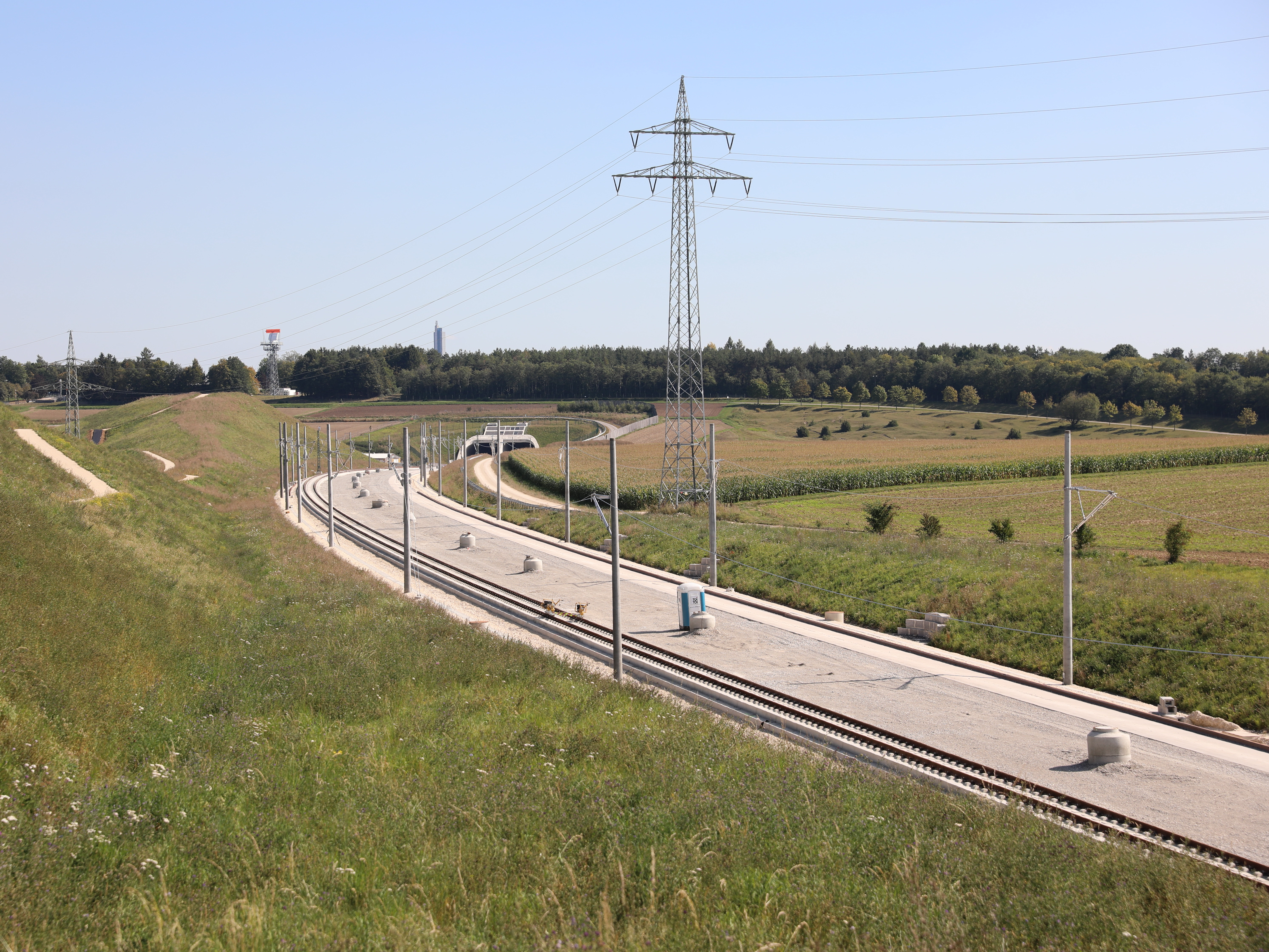 Neubaustrecke Wendlingen–Ulm bei Dornstadt